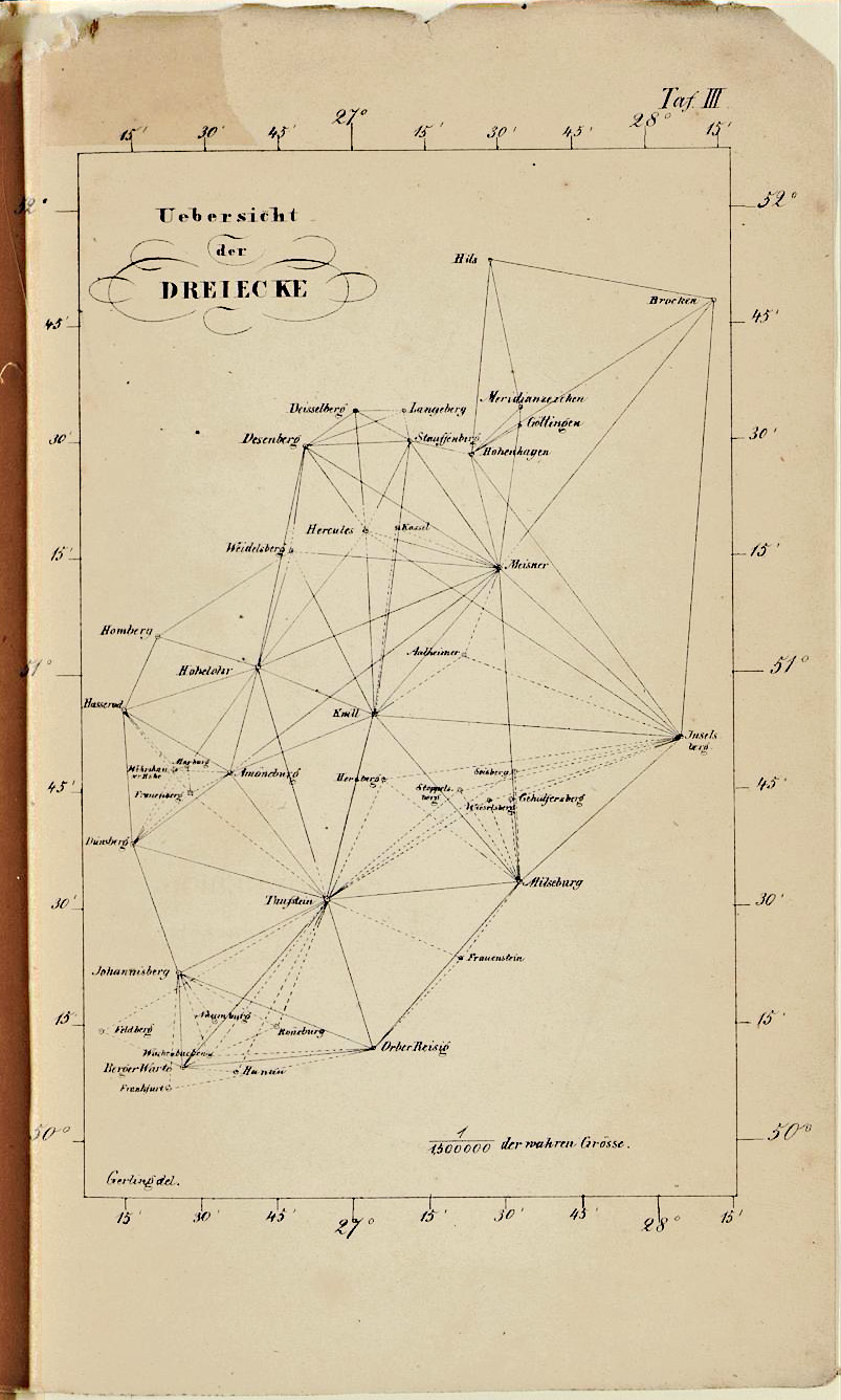 "Übersicht der Dreiecke" der Triangulation in Kurhessen von Christian Ludwig Gerling (1788–1864). Tafel III aus: Beiträge zur Geographie Kurhessens und der umliegenden Gegenden : aus der kurhessischen Triangulierung der Jahre 1822 bis 1837. Enthaltend die Messungen der Jahre 1835, 1836 und 1837 nebst der definitiven Berechnung der ganzen Arbeit. Erscheinungsjahr 1839.